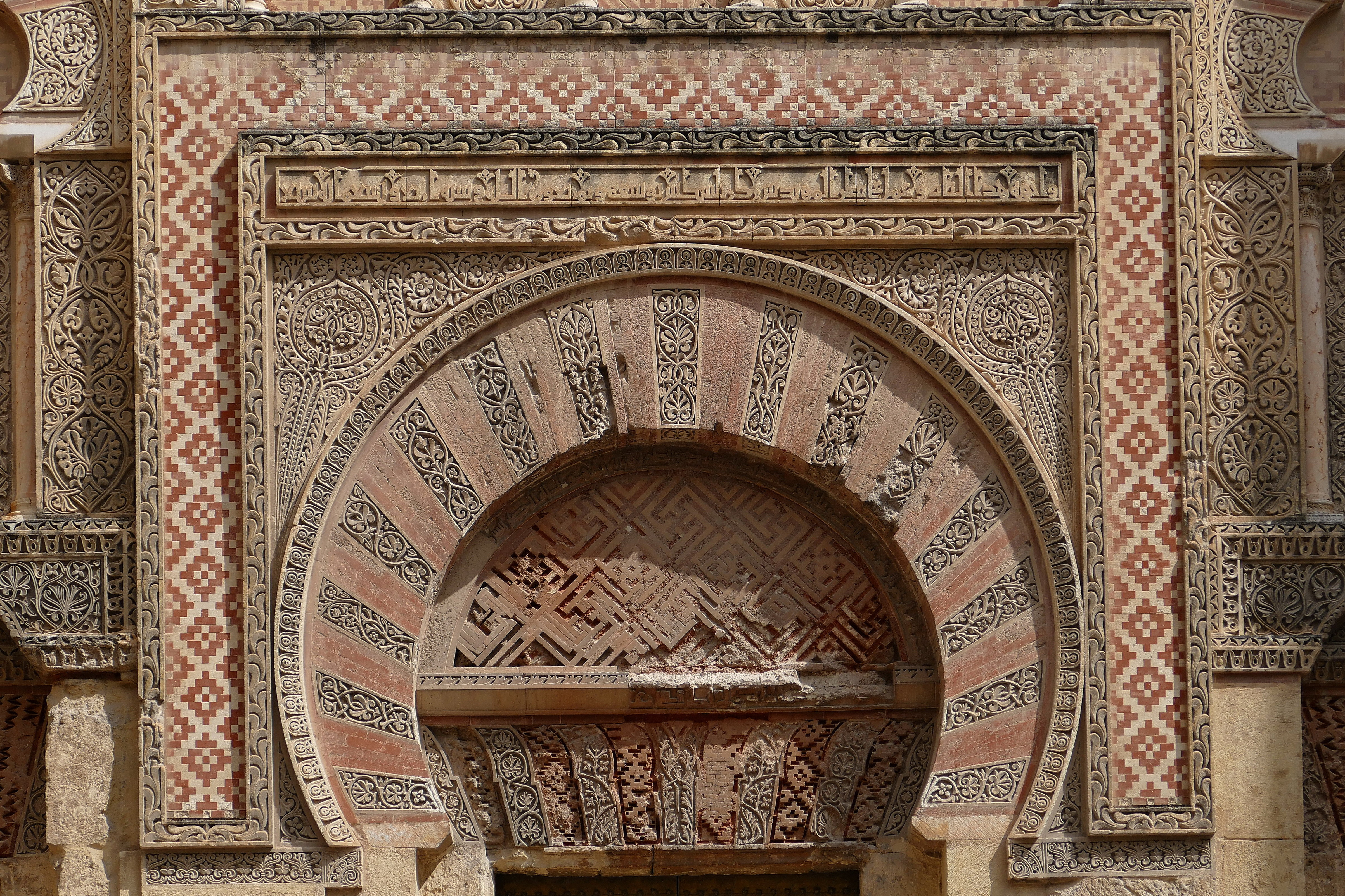 Puerta de San Ildefonso an der Westfassade der Moschee-Kathedrale in Córdoba, Spanien